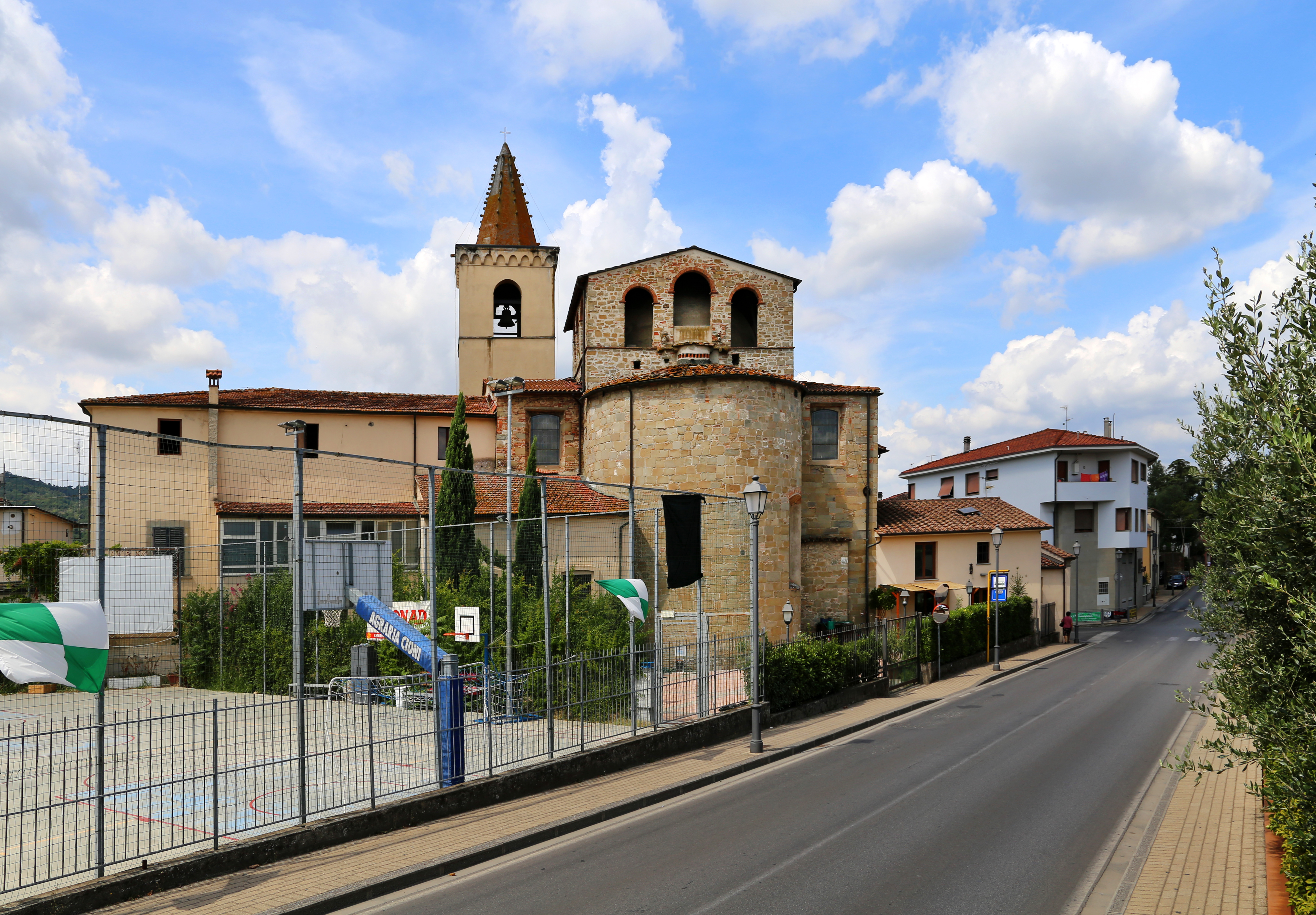 Chiesa di San Pietro (Casalguidi) This is a photo of a monument which is part of cultural heritage of Italy.